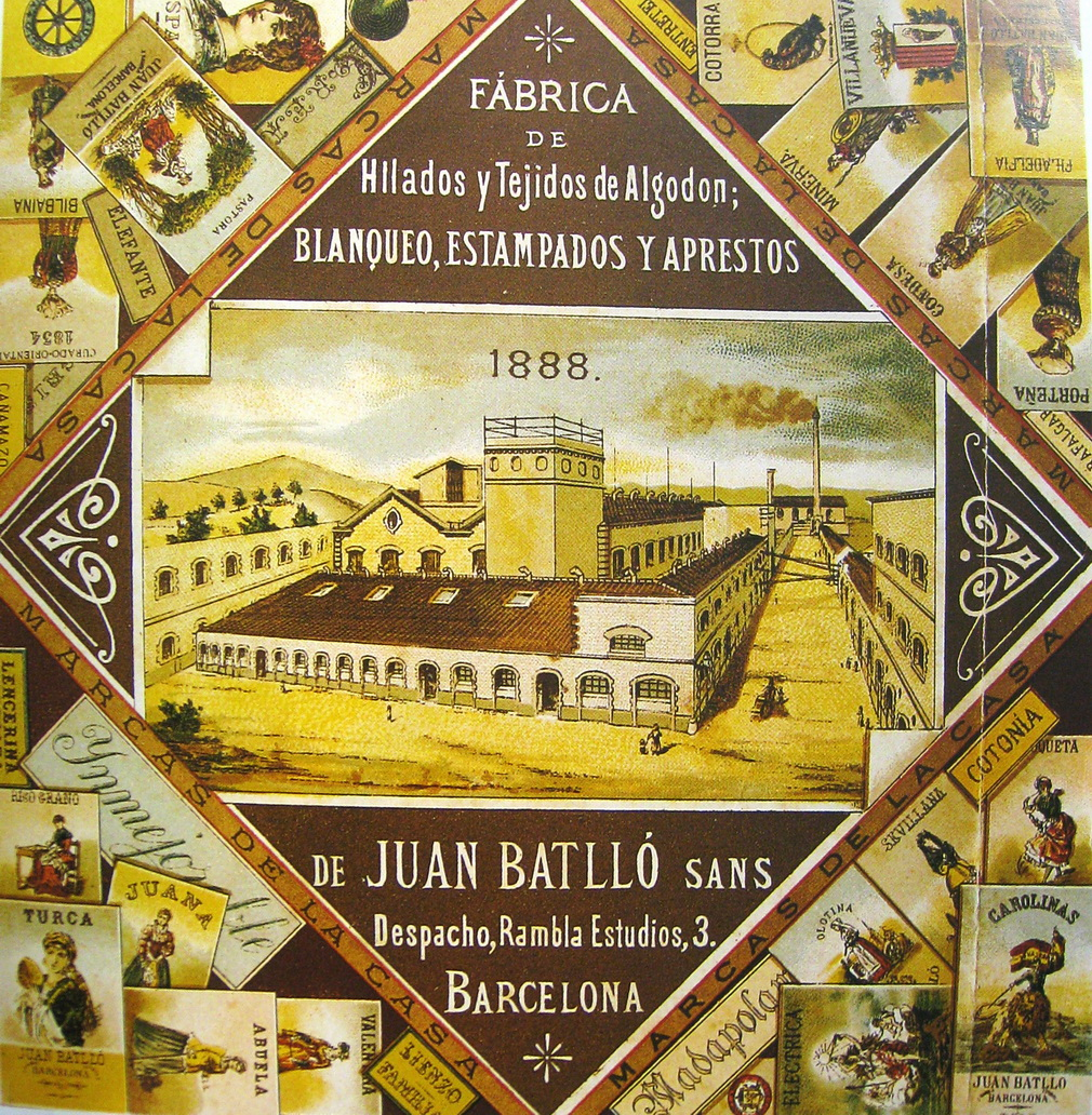 Etiqueta de la fàbrica "Sobrinos de Joan Batlló"